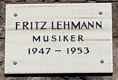 Göttingen (Merkelstraße 7, 37085 Göttingen): Göttinger Gedenktafel für Fritz Lehmann